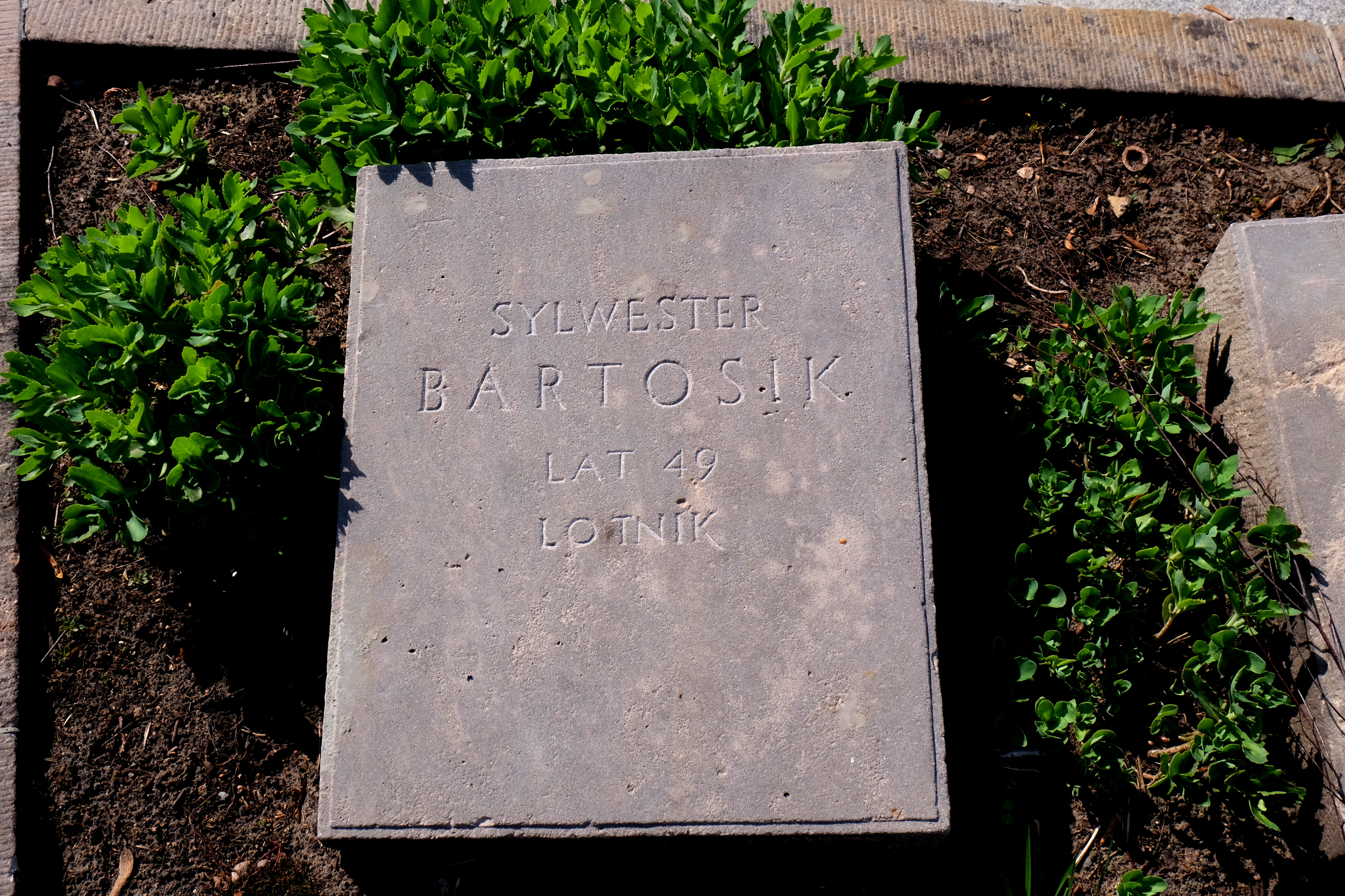 Grób działacza komunistycznego Sylwestra Bartosika na Cmentarzu Wojskowym na Powązkach w Warszawie